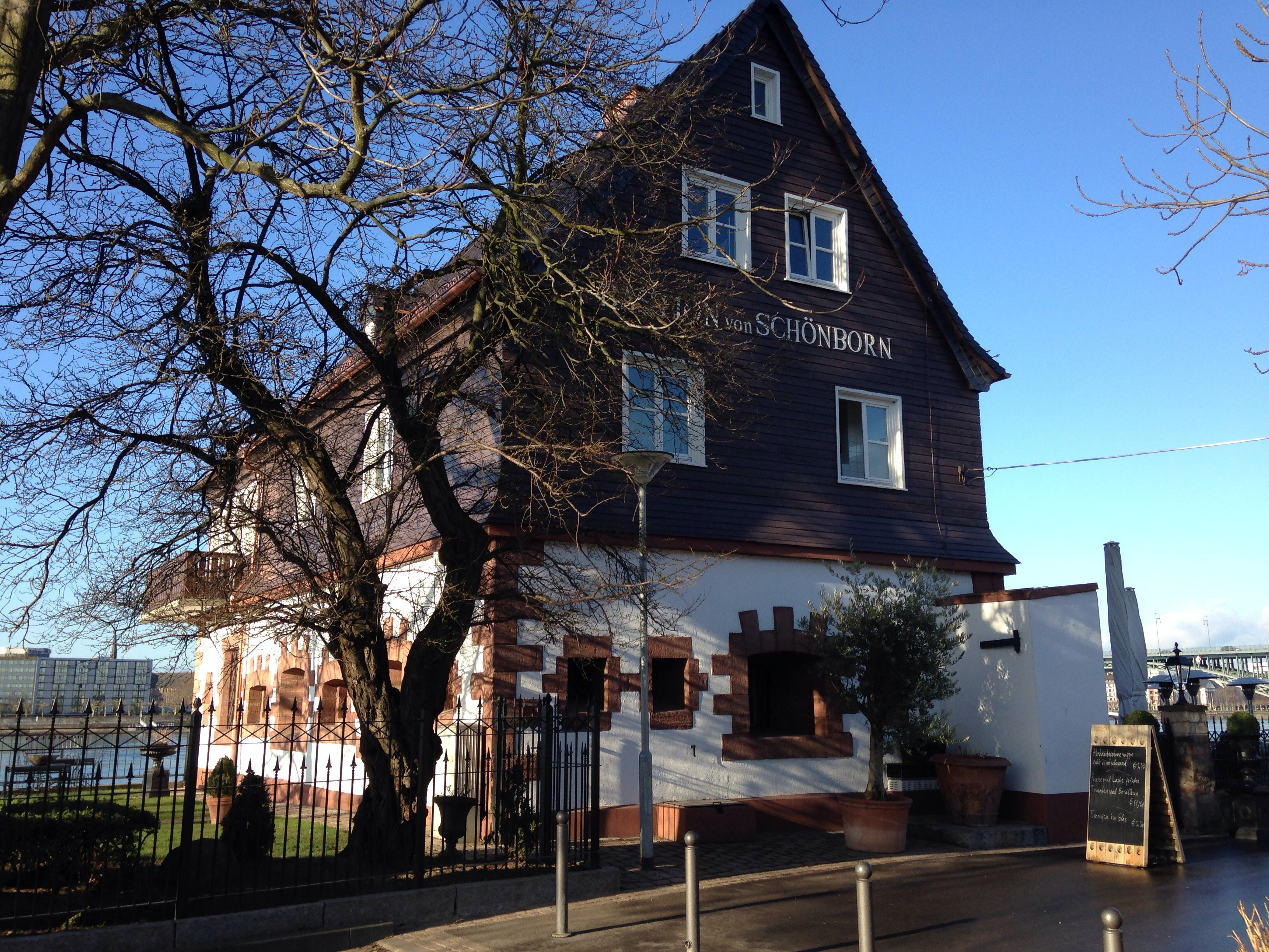 Bastion Schönborn am Rhein in Mainz-Kastel (Stadtteil von Wiesbaden)